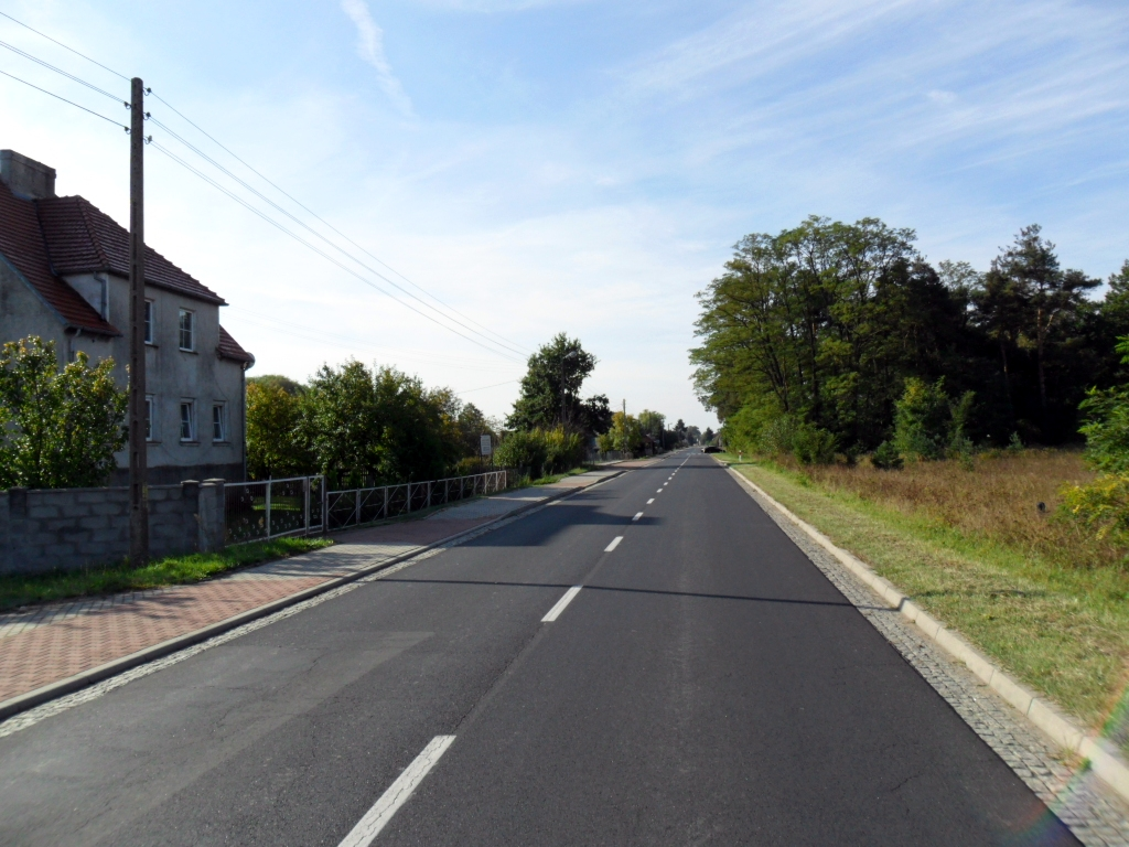 Droga dojazdowa do wsi.